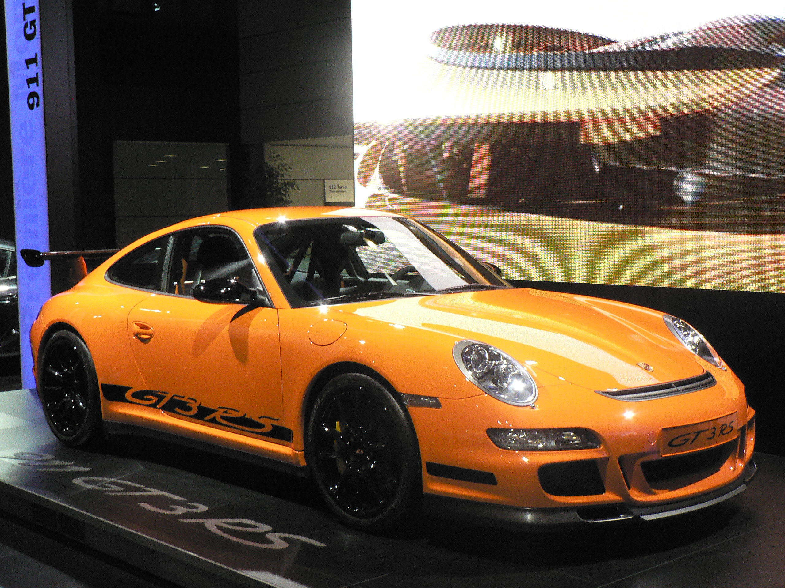 Mondial de l automobile de Paris (October 2006)